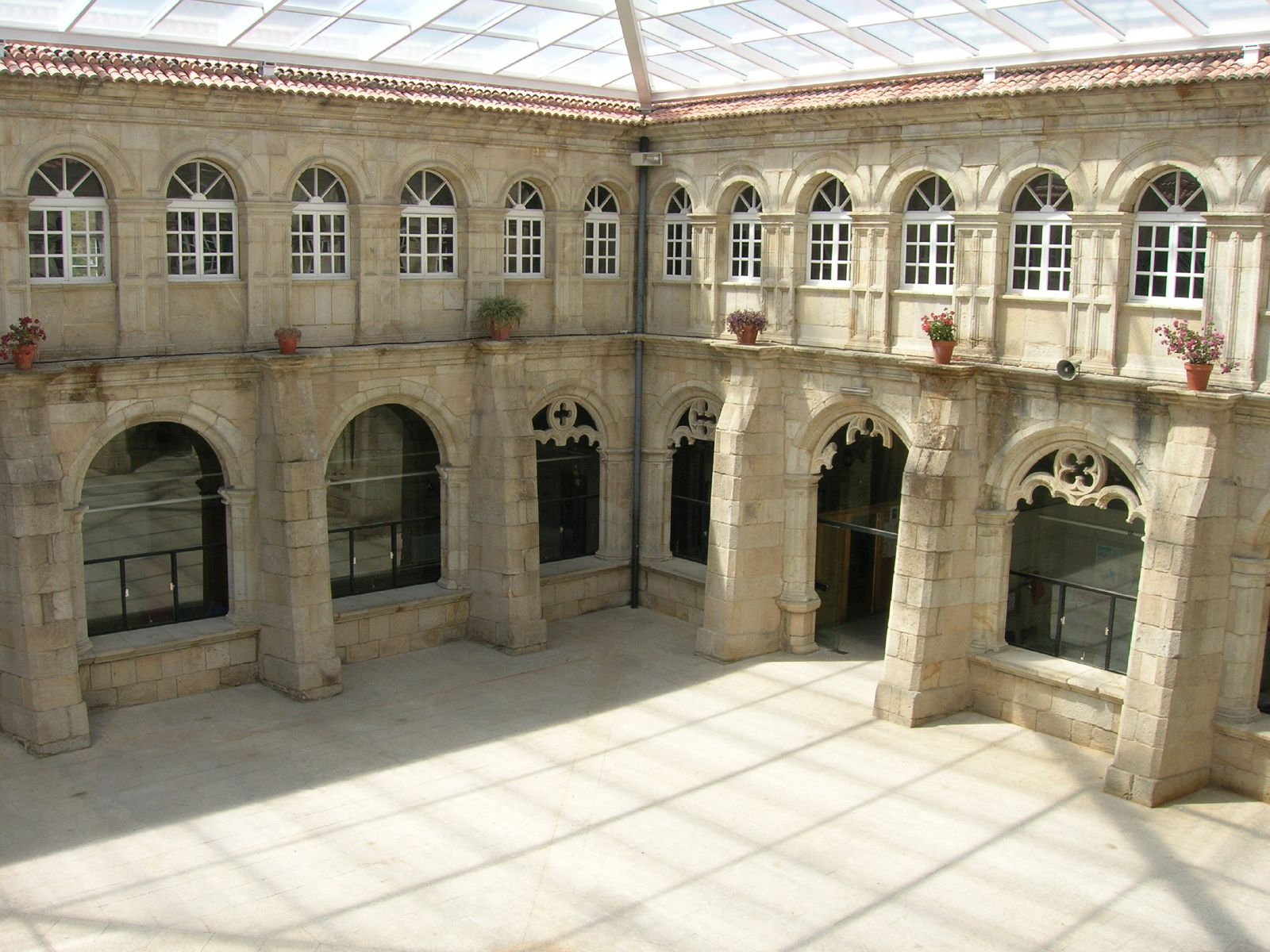 Monasterio de Montederramo. Claustro Reglar, del siglo XVI, con el primer cuerpo gótico tardío y el segundo renacentista.